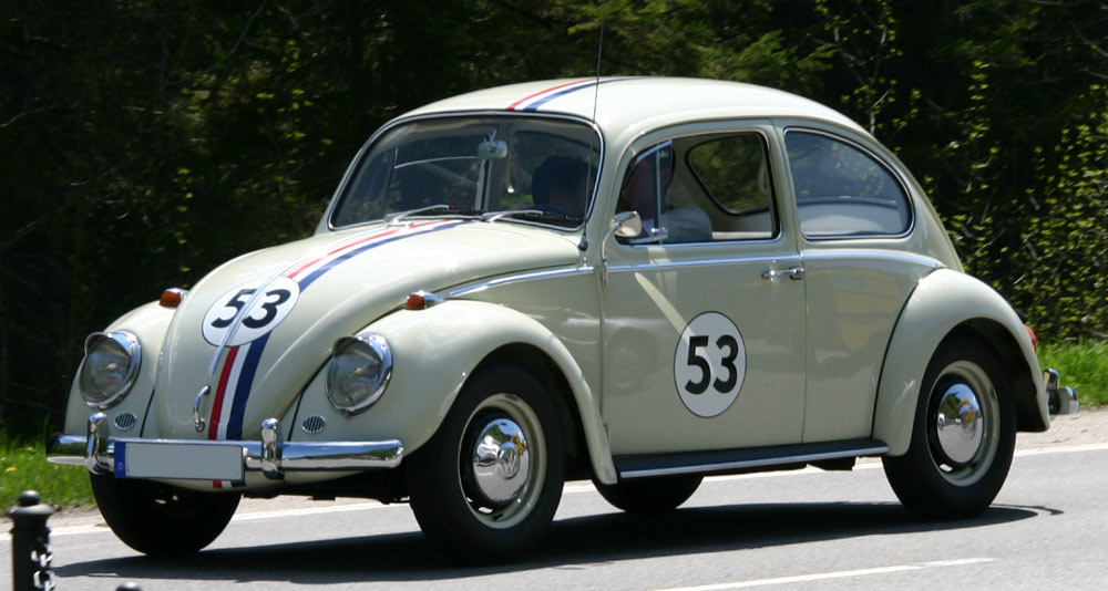 Herbienachbau